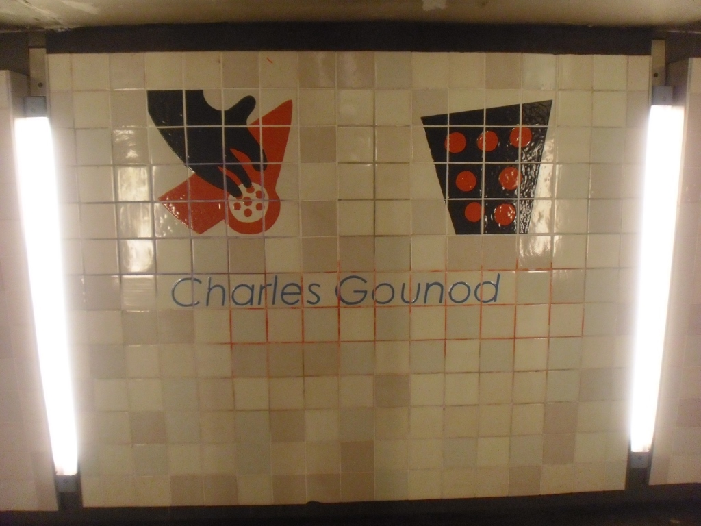 Erinnerung an den Komponisten Charles Gounod (1818-1893) im U-Bahnhof Deutsche Oper in Berlin